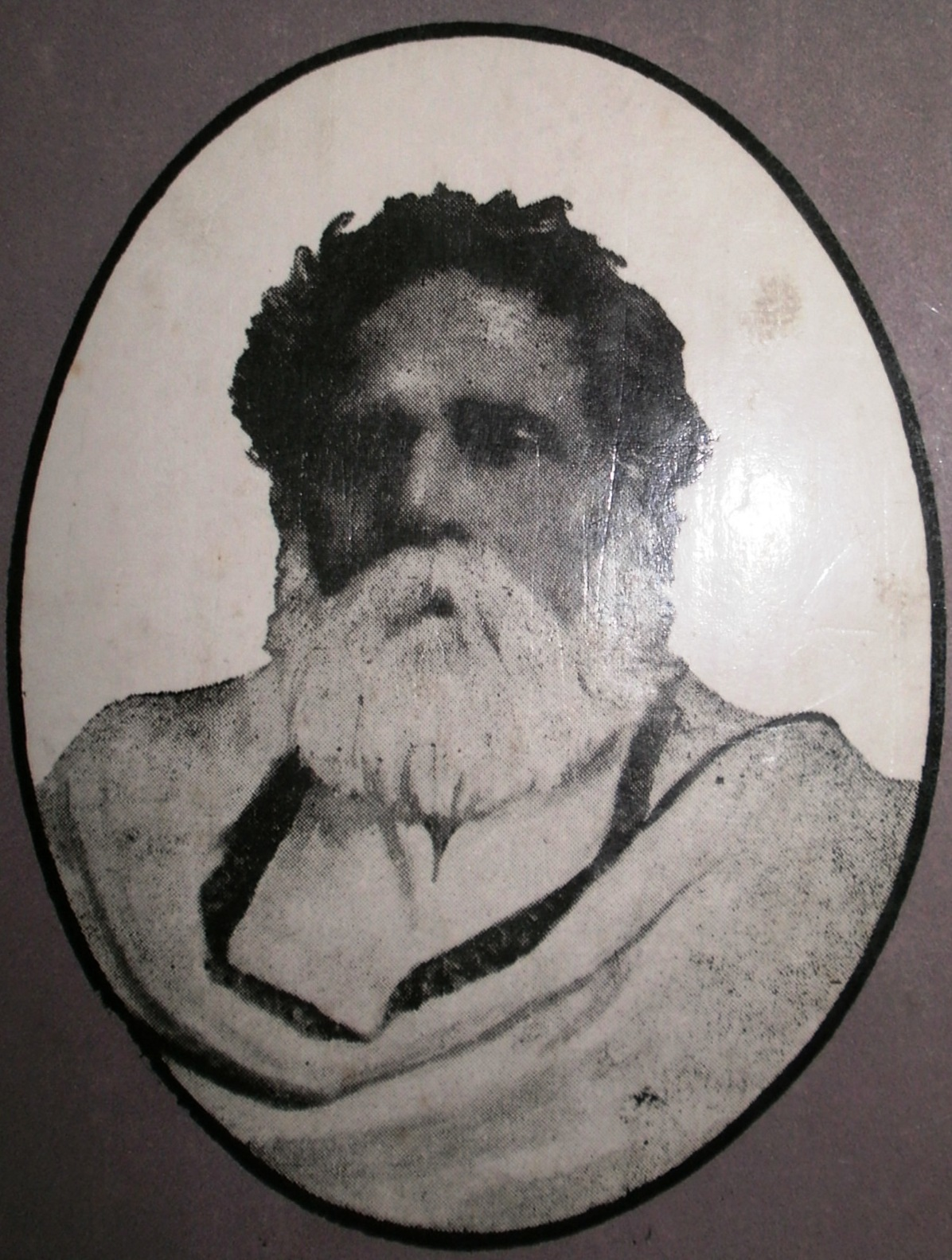 রাজনারায়ণ বসু'র আলোচচিত্রের প্রতিলিপি